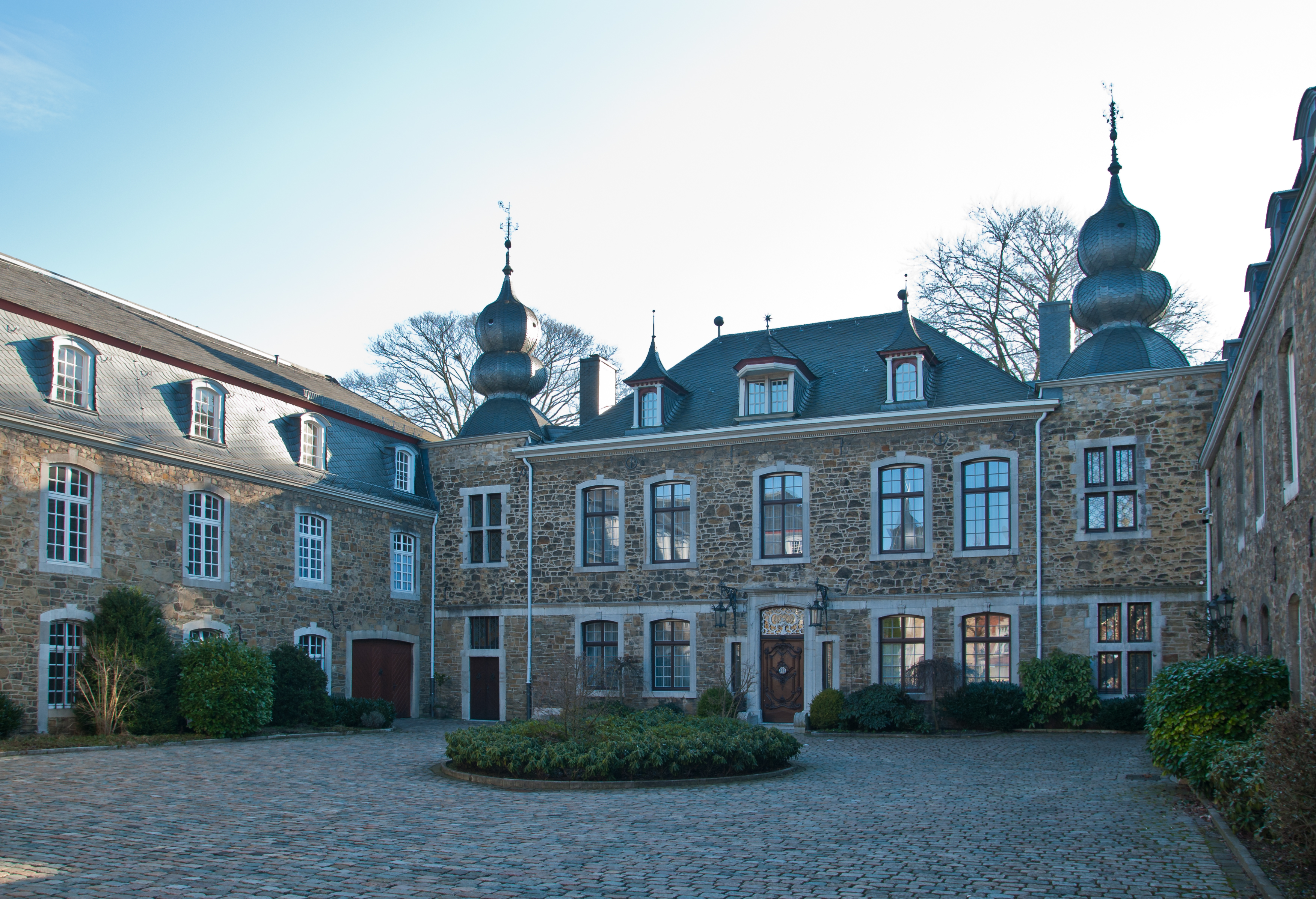 Der Kupferhof Grünenthal in Stolberg (Rheinland). Ehrenhof.